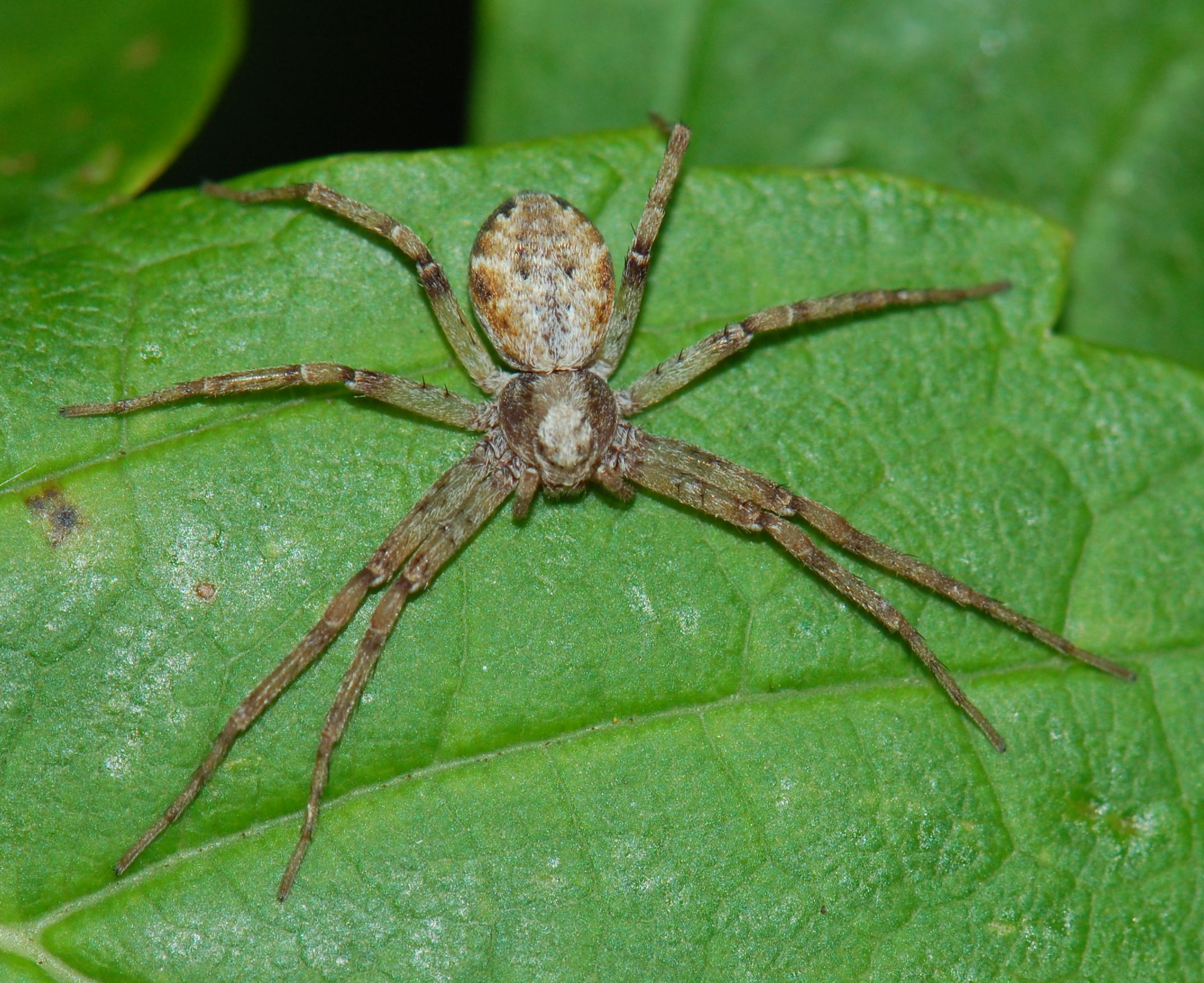 Philodromus cespitum, Weibchen. Berlin, Bezirk Pankow, Deutschland. Bestimmung genitalmorphologisch durch K.-H. Kielhorn.